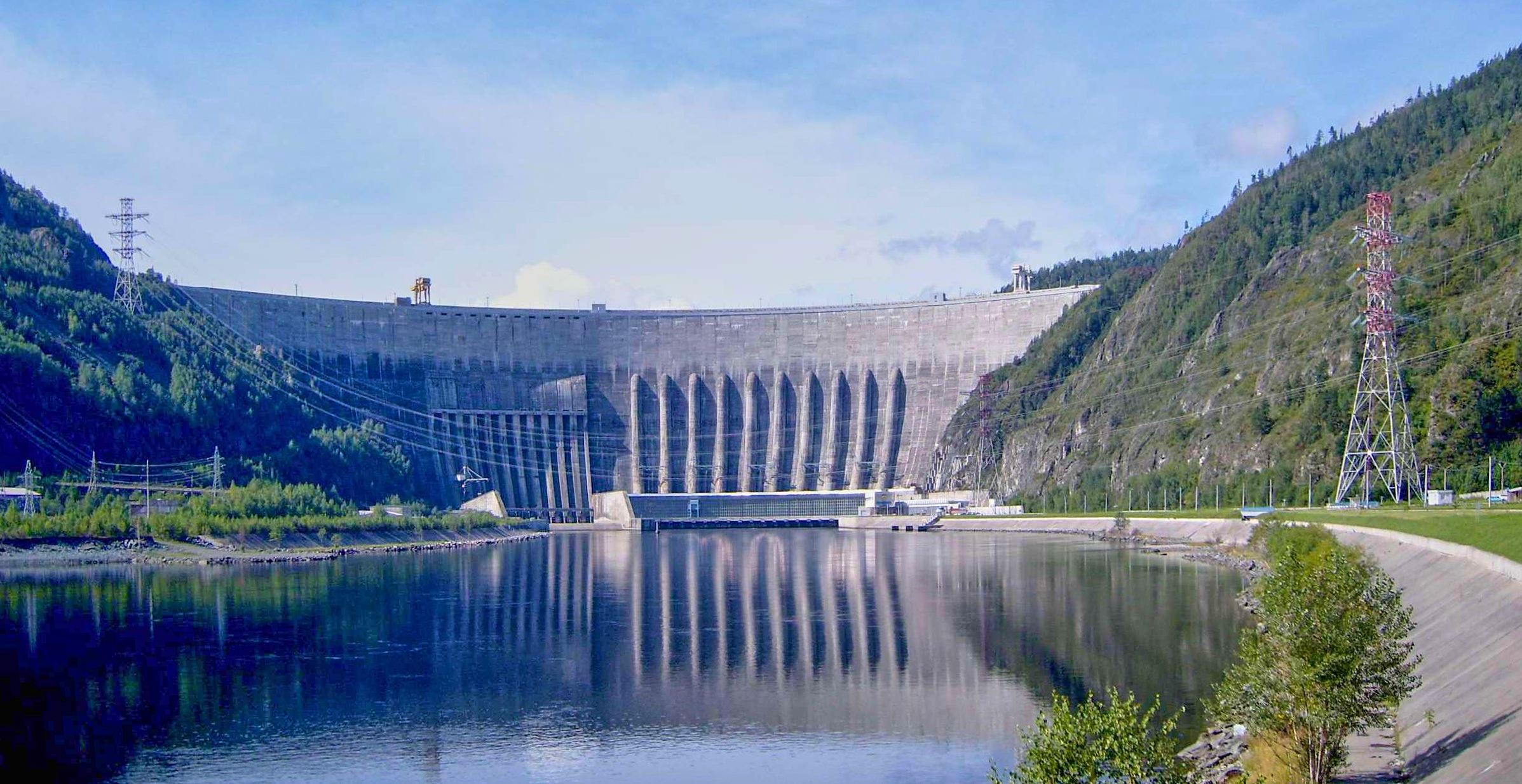 Вид на Саяно-Шушенскую ГЭС в 2007 году